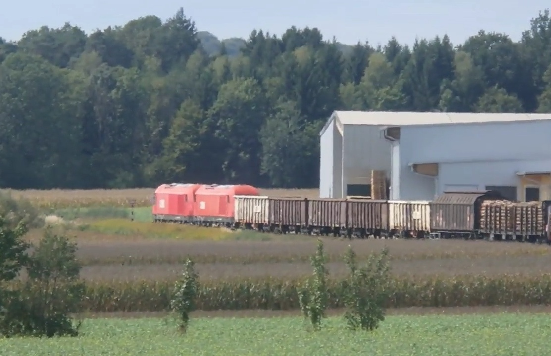 Ein Güterzug bespannt mit zwei ÖBB 2016 Diesellokomotiven auf der Thermenbahn in der Südoststeiermark zwischen der Haltestelle Übersbach und dem Bahnhof Söchau (hier in Fürstenfeld, Ortsteil Hartl).